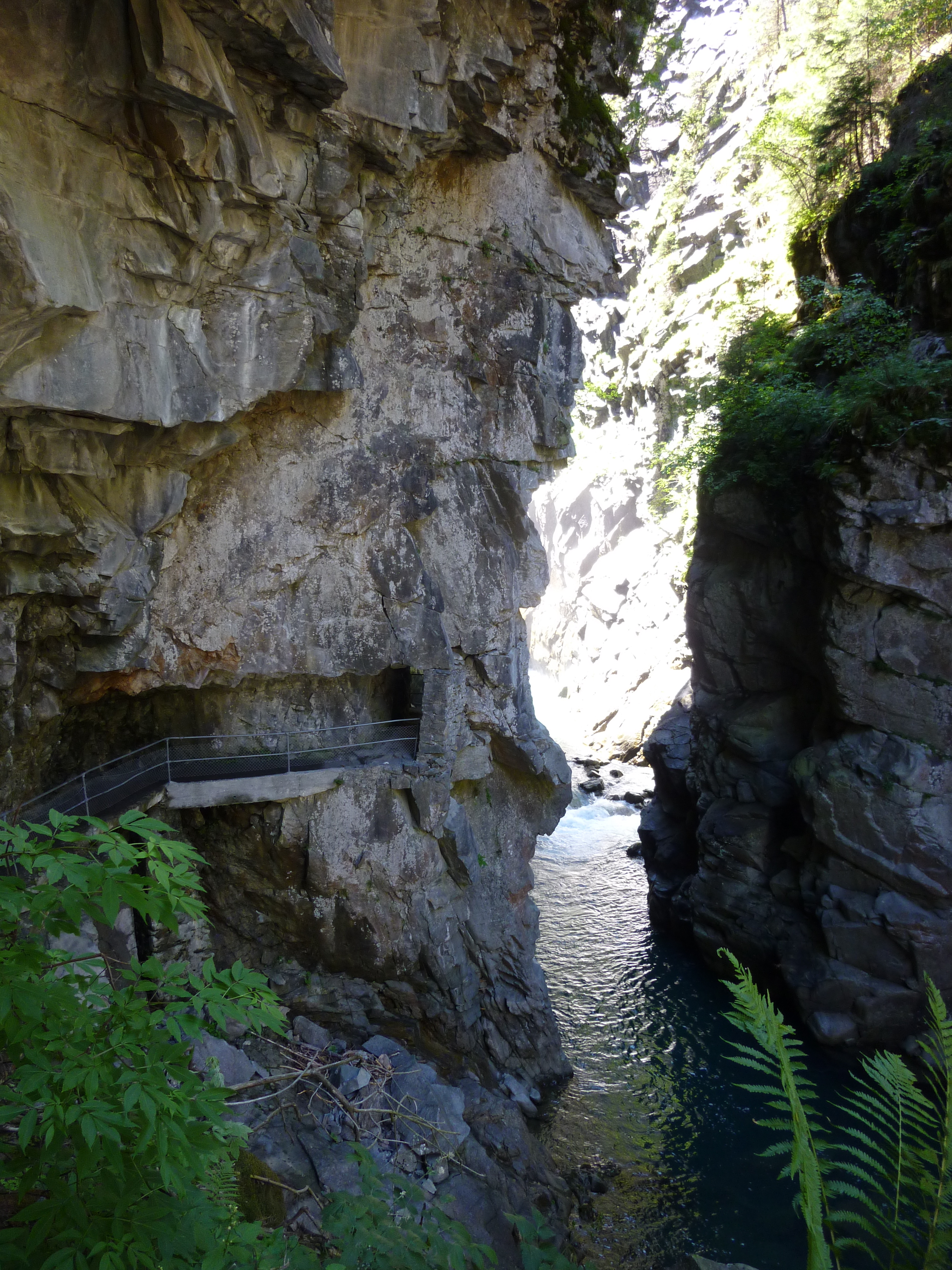 Rofflaschlucht: Blick in die Schlucht